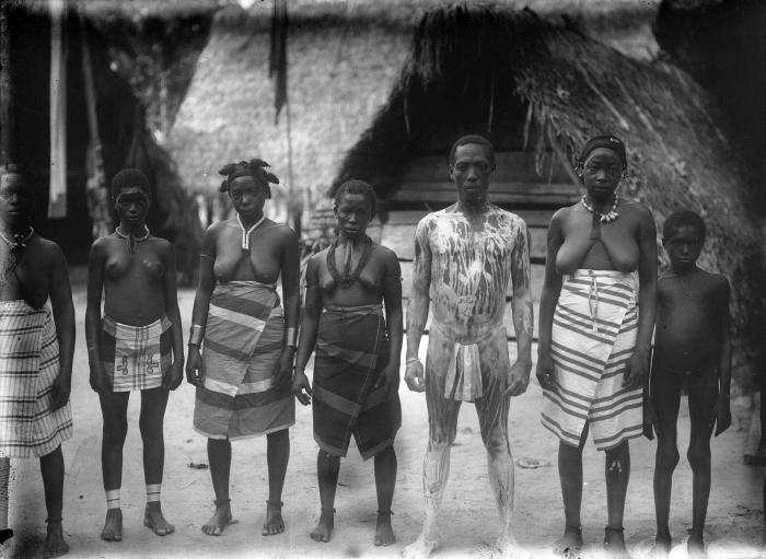 Negatief. Een Ndyuka Marron, omringd door vier vrouwen,een meisje en een jongen. De man heeft (waarschijnlijk) een kruidenbad genomen en daarna heeft hij zich vanaf zijn schouders tot aan zijn tenen besprenkeld met Pembadoti. Dit kan hij om verschillende redenen gedaan hebben. Het kan zijn dat hij ziek is (geweest) en dat hij onder behandeling staat van een religieuze specialist. Een andere reden kan zijn dat hij zich er als man weerbaar mee maakt tegen kwade geesten en tegen gewapende aanvallen van tegenstanders. De vrouwen dragen een pangi (heupdoek) en amuletten, zowel om de hals als om de enkels. Het meisje draagt een kwei (schort). De man een kamisa (heupdoek). De jongen draagt alleen kamitete (lendendoek), het koord om zijn heup en een amulet om de hals. De foto is genomen in het dorp Diitabiki (Drietabbetje/Dritabiki), de residentie van de Gaaman (Graman) aan de Tapanahonirivier. . Groepsportret van Aukaner Marrons in Drietabbetje, onder wie een met witte klei ingesmeerde man